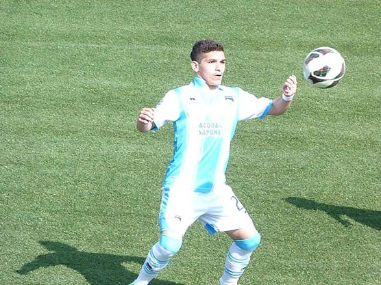 Italia